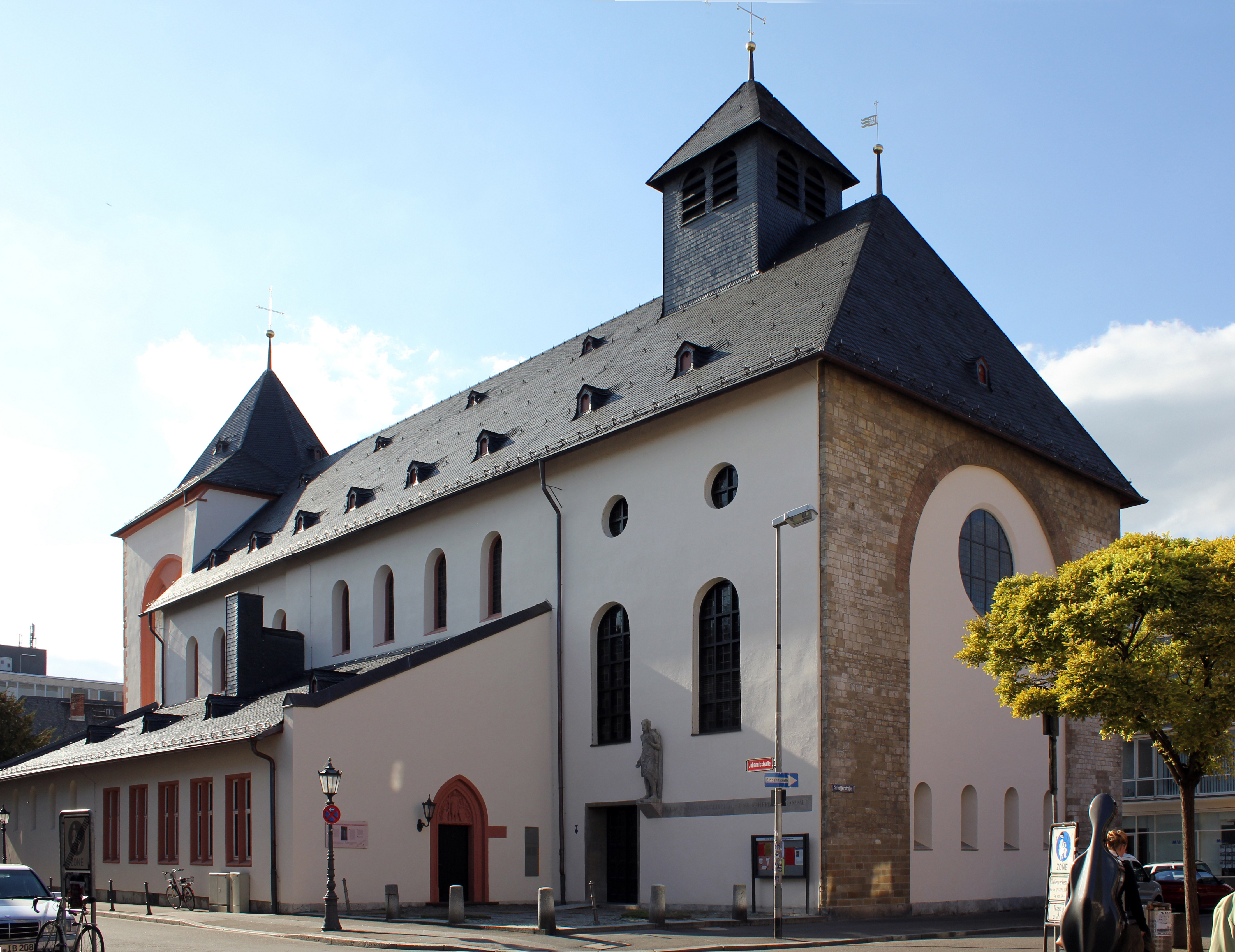 Die evangelische Johanniskirche ist die älteste Kirche der Stadt Mainz. Sie war vermutlich auch die erste Bischofskirche der Stadt. Der spätkarolingische Bau wurde unter Erzbischof Hatto (891 – 913) als dreischiffige Basilika errichtet. Von diesem Bau sind die Seitenmauern und Pfeiler sowie die Fenster des Mittelschiffs weitgehend erhalten. Bis 1767 war die Kirche mit dem Mainzer Dom verbunden. 1828/30 wurde die Johanniskirche die erste evangelische Kirche der Stadt.